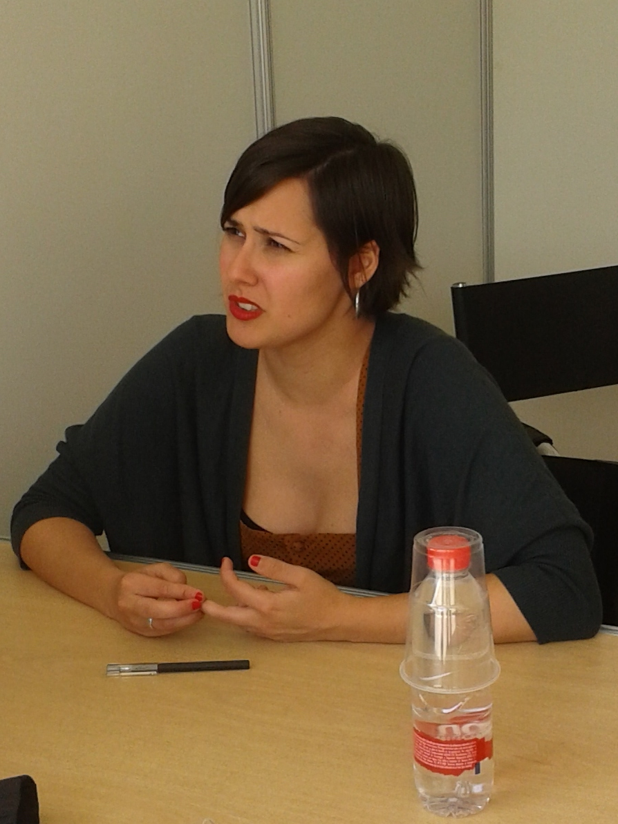 Jenn Díaz, a la Fira del Llibre de València 2017